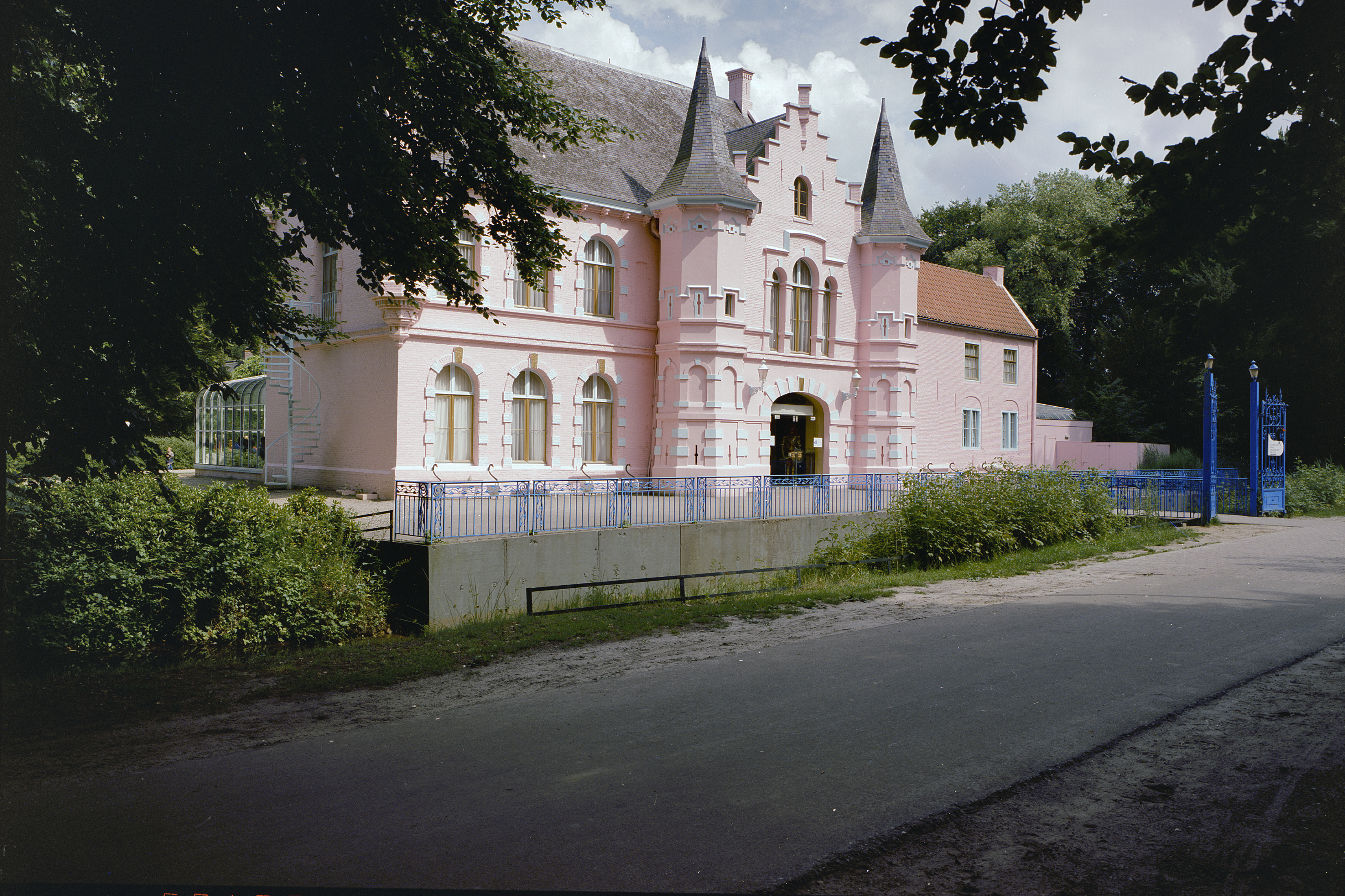 Kasteel Doultremont: Exterieur OVERZICHT VOORGEVEL